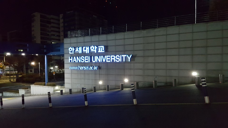 한세대학교 정문